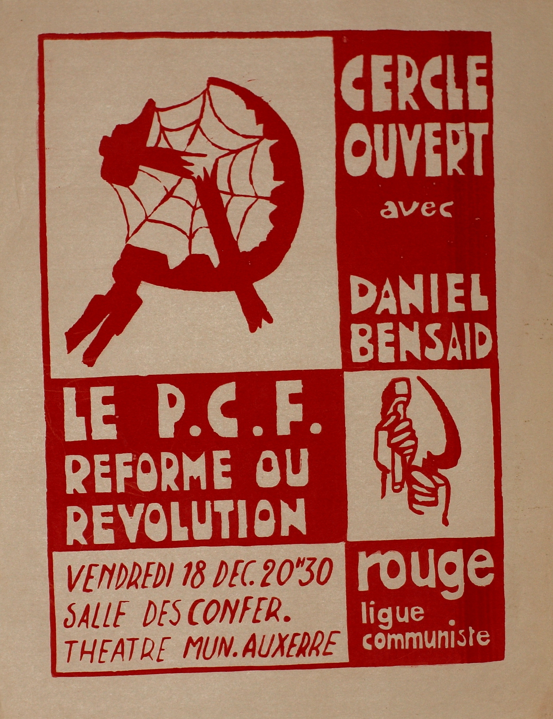 Exposition Mai 68 et la suite..., à Villeneuve-la-Guyard (Yonne, France) , du 22 au 29 mai 2018